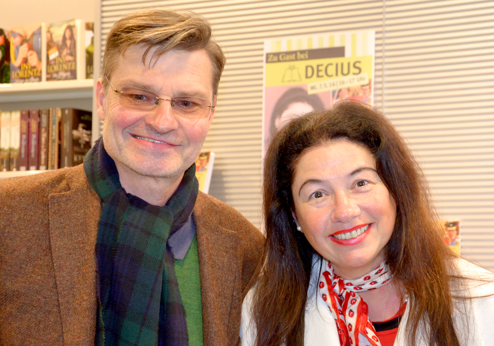 Verleger Heinrich Prinz von Hannover und die Autorin Anna Eunike Röhrig zur Vorstellung ihres Buches Die Herzöge von Cambridge in der Buchhandlung DECIUS ...